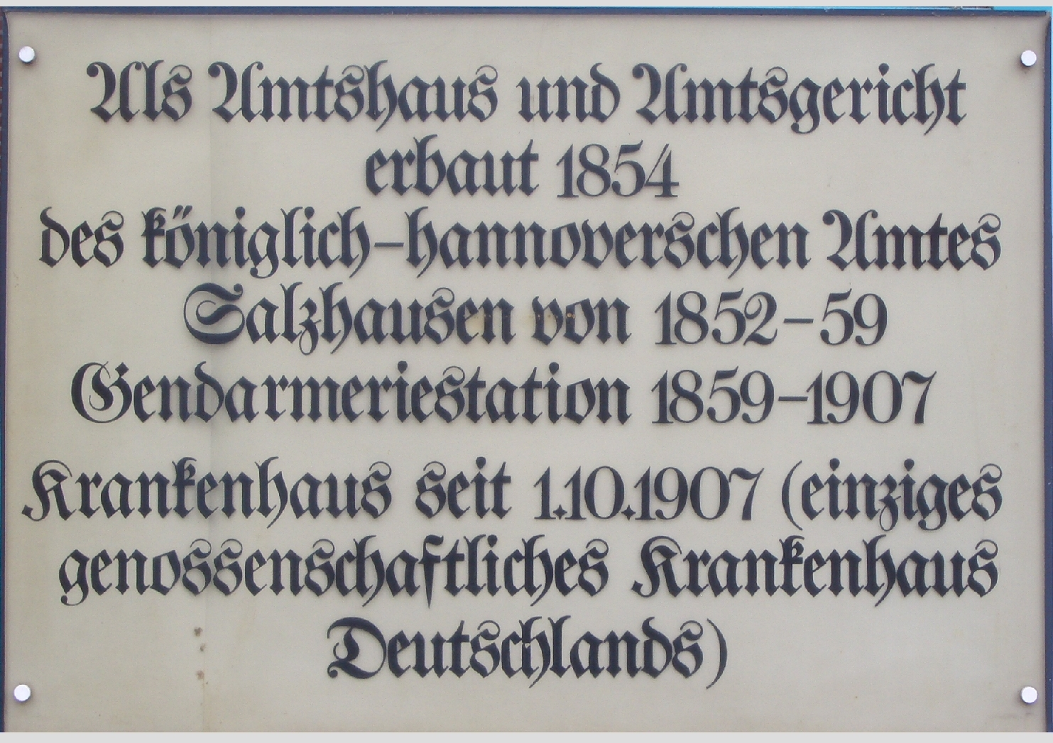 Tafel am Krankenhaus Salzhausen (Niedersachsen) zur Geschichte des Gebäudes mit Hinweis auf Genossenschaft als Träger